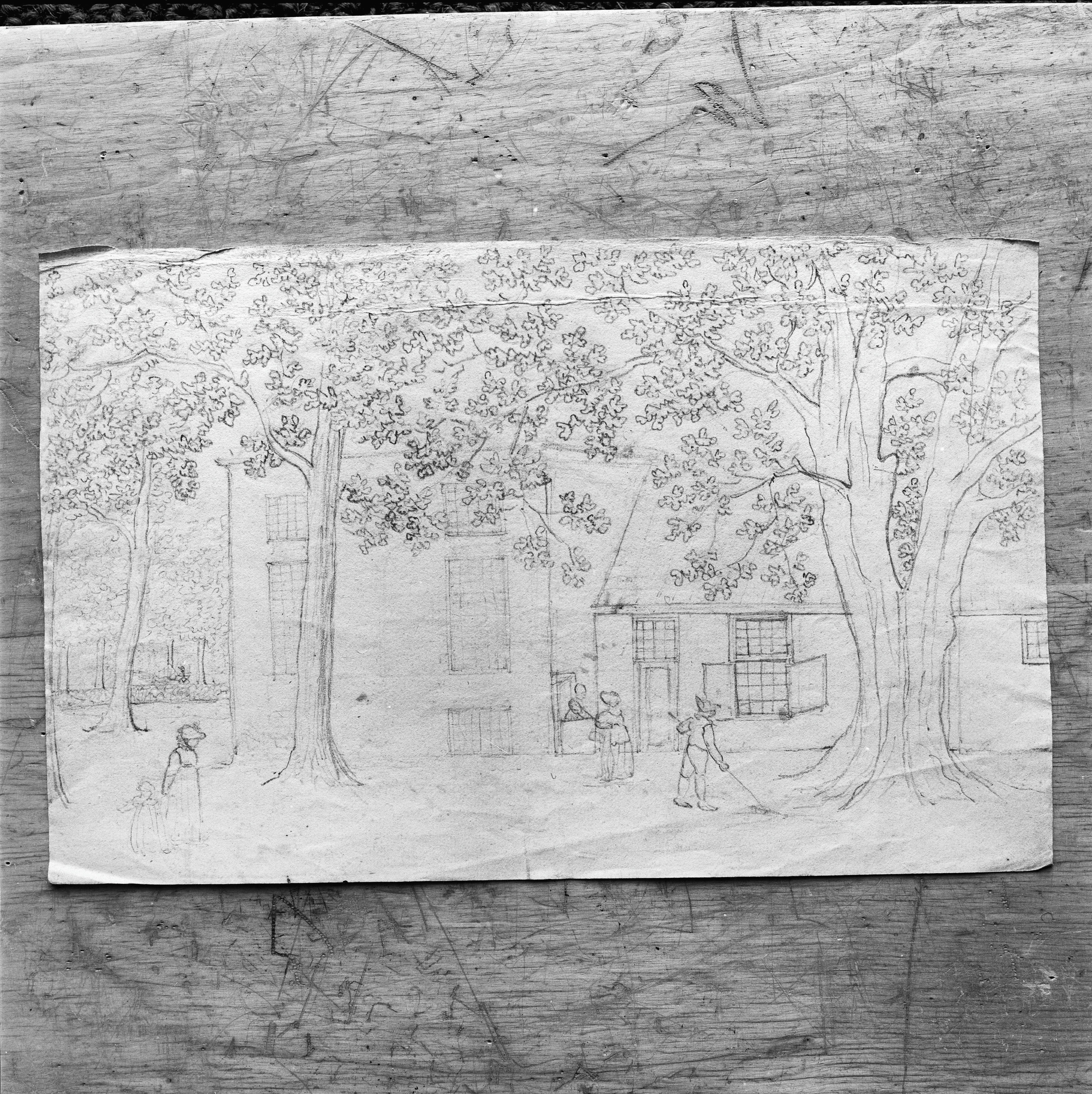 Huis Spiegelrust: tekening van J.v.Winter ca.1800, Collectie Six